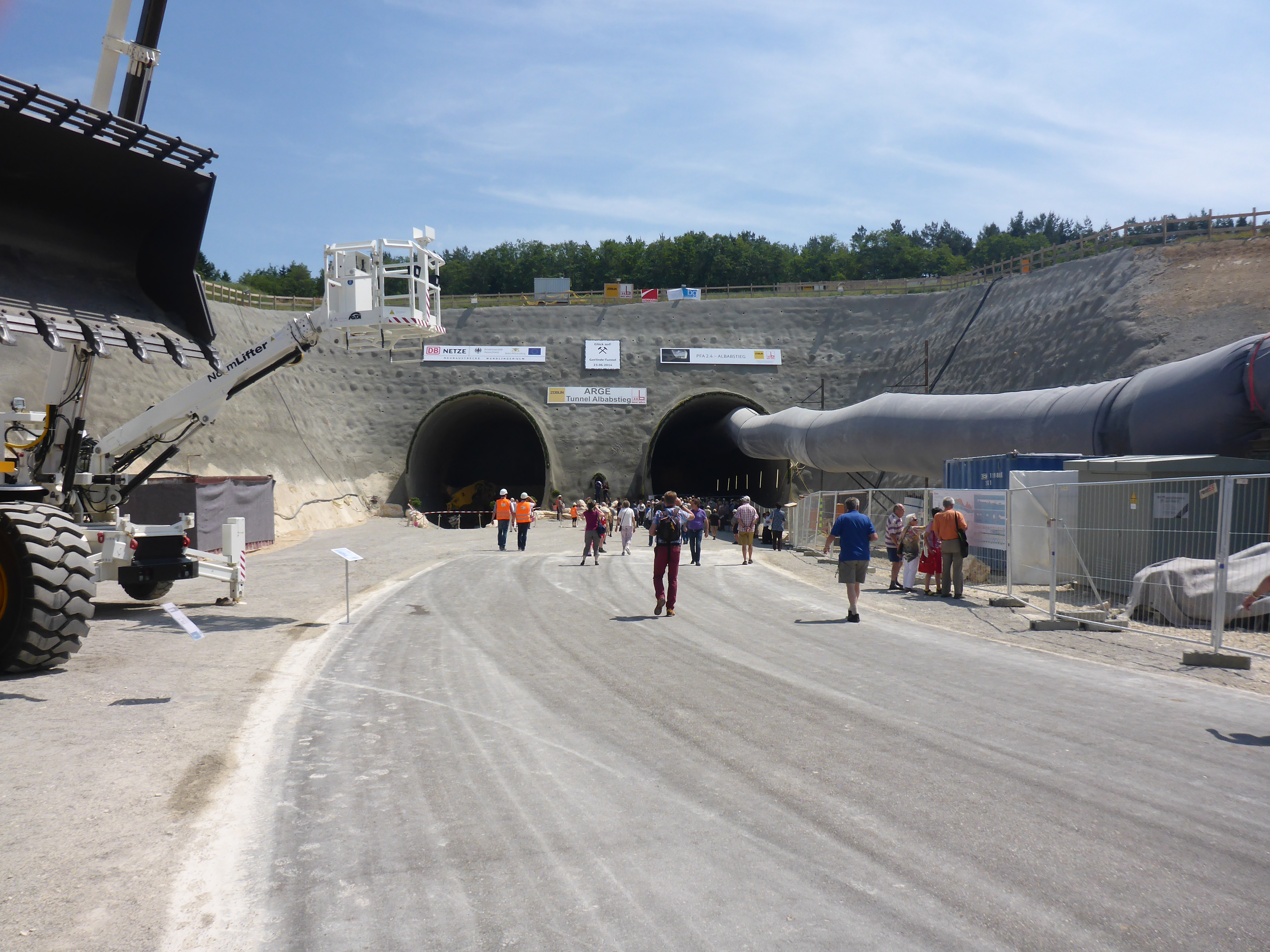 Albabstiegstunnel, Portal Dornstadt